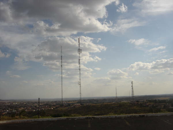 Vista de Catalão a partir do morro de São João, avistando-se o oeste, com destaque para a região das antenas.